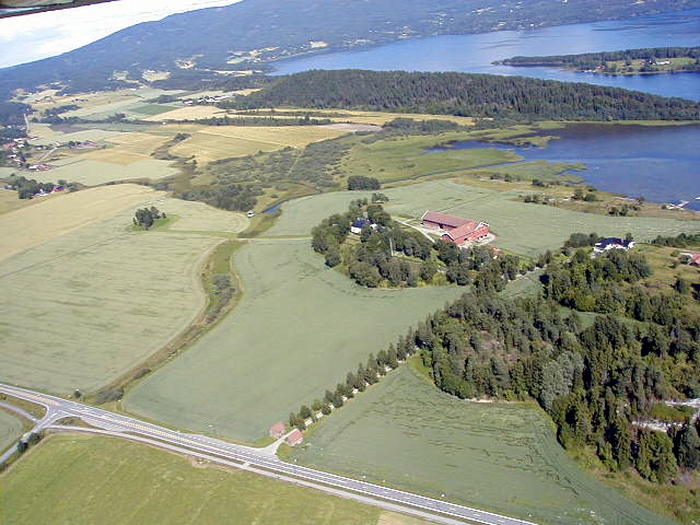 Stein gård og Steinsfjorden (del av Tyrifjorden), Åsa